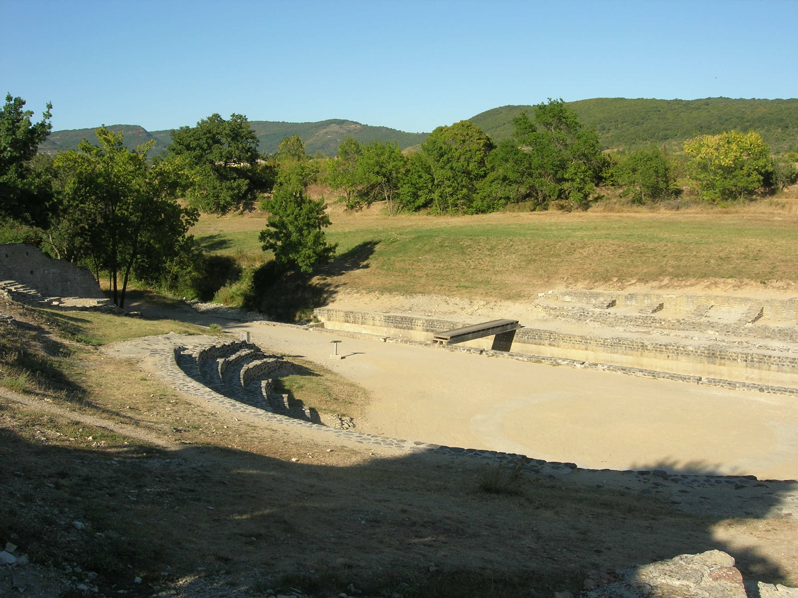 Théâtre romain d'Alba-la-Romaine en Ardèche (France)